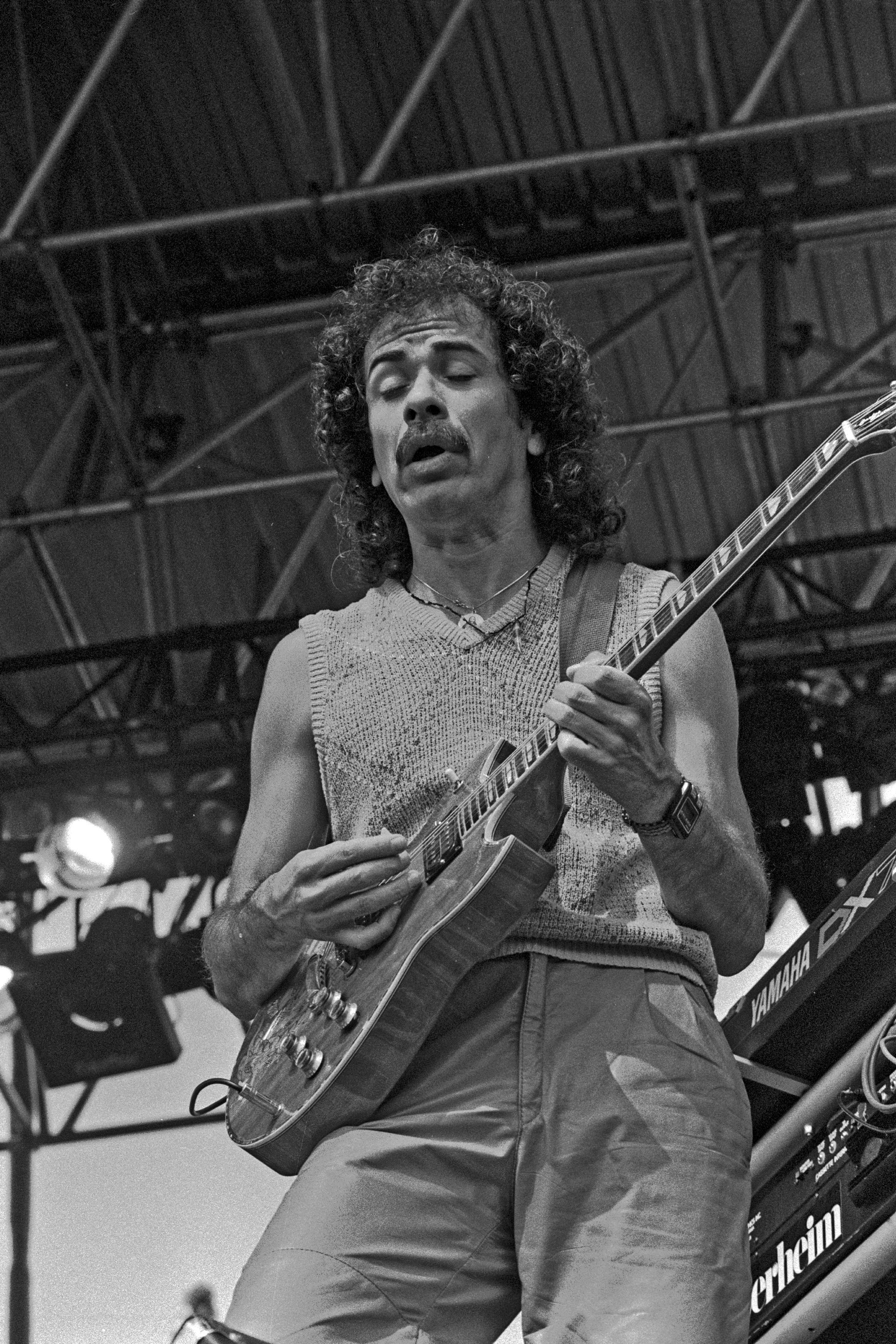 Santana beim gemeinsamen Auftritt mit Joan Baez und Bob Dylan(welche Mischung!) , Hamburg, Mai 1984